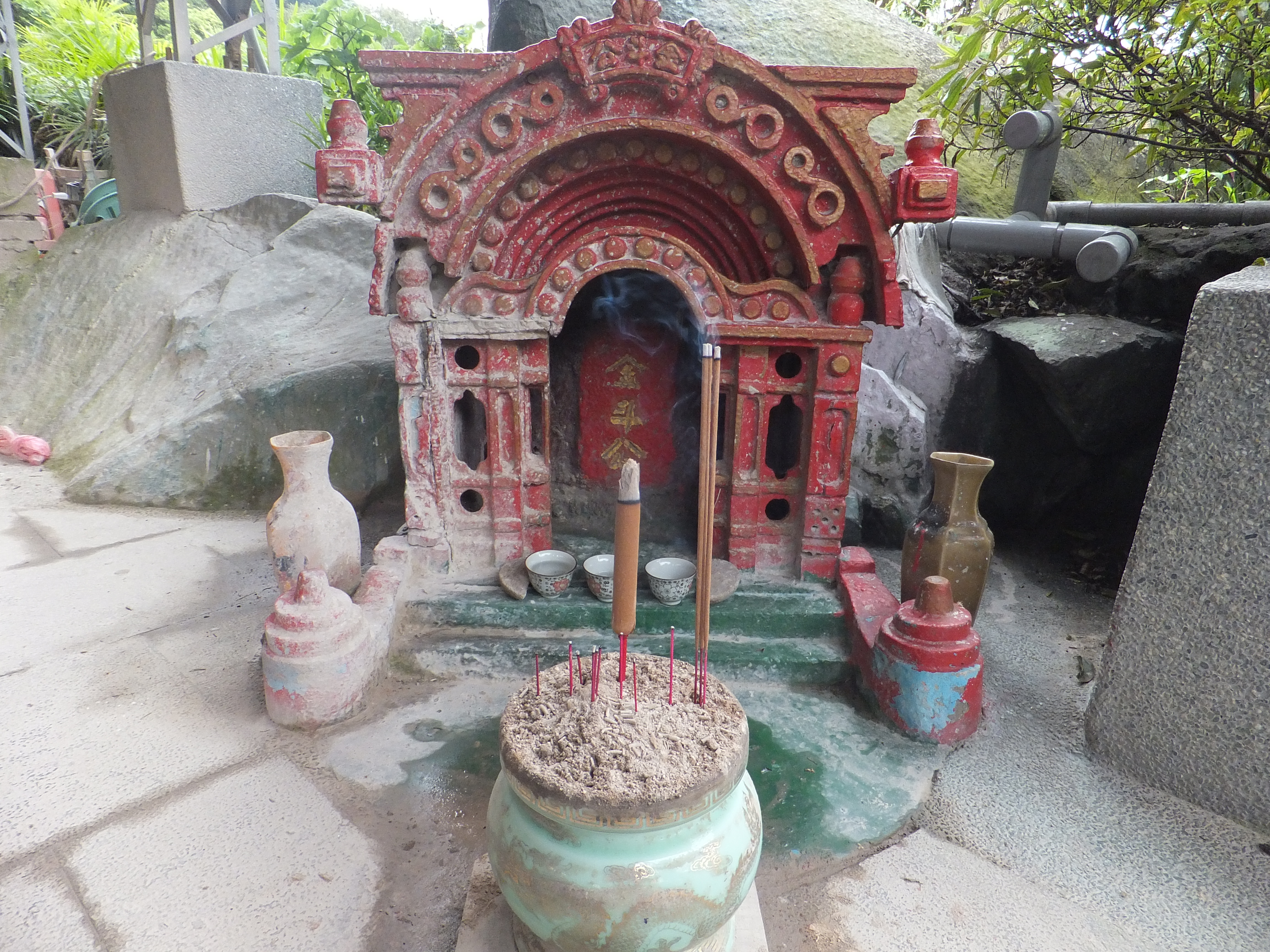 中文（台灣）: 觀音山旅遊服務中心附近金斗公